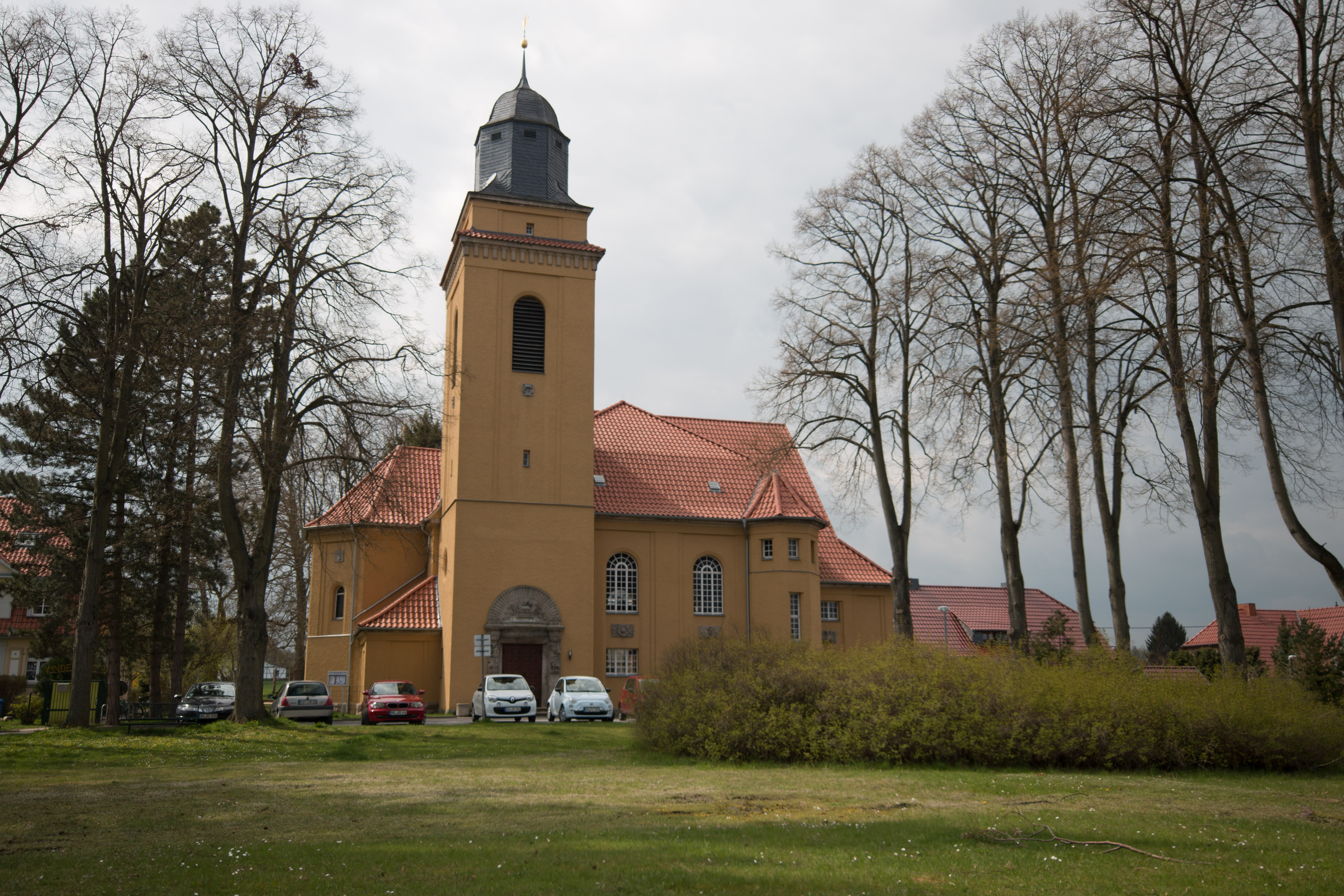 Klinikkirche Pfafferode, Aussenansicht